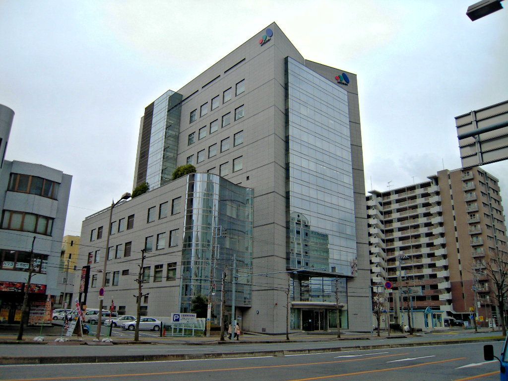 Mito Shinkin Bank head store.